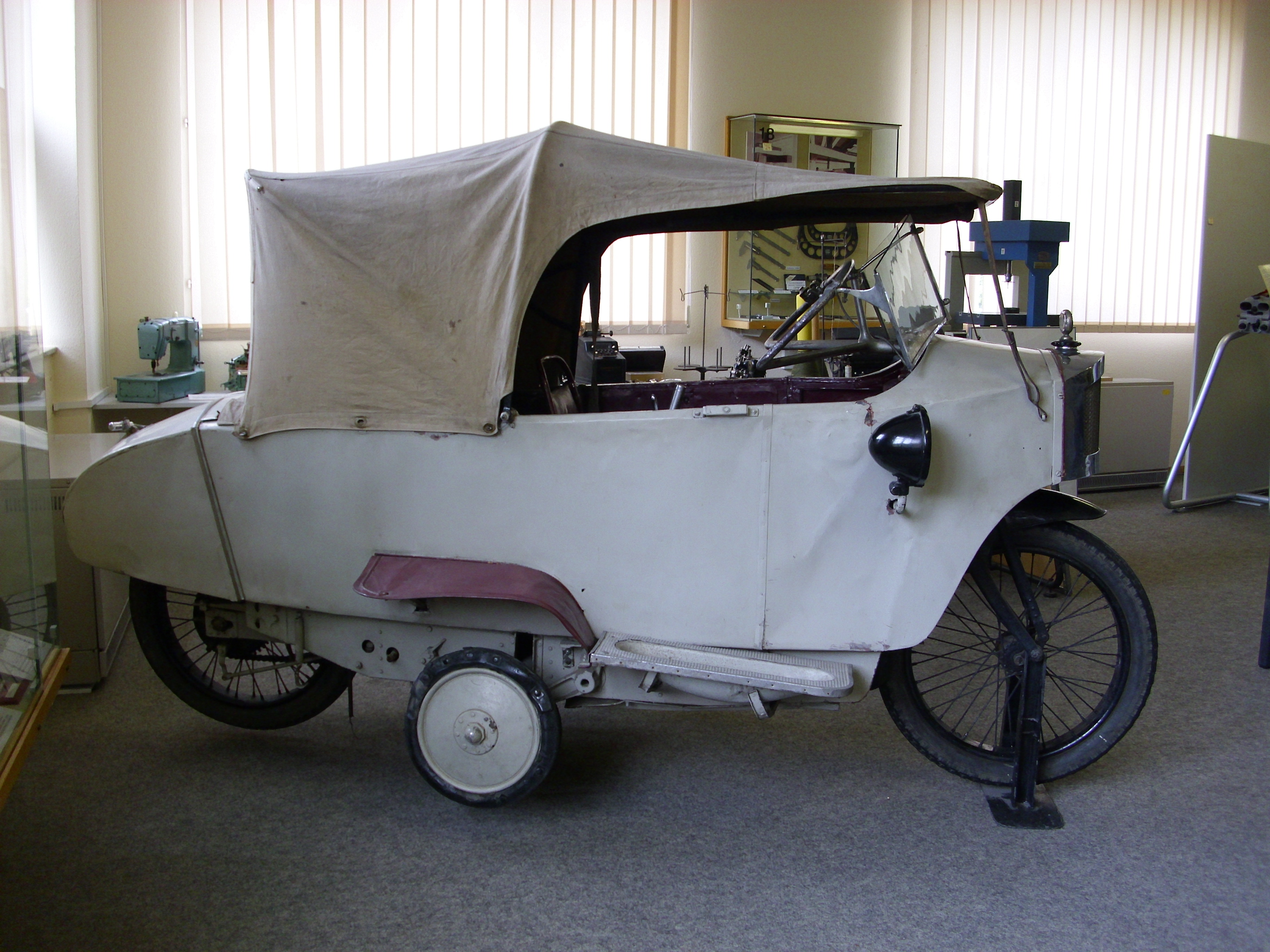 Winkler Einspurauto von 1927-1929